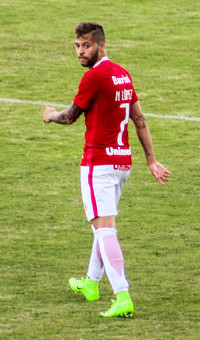 Nico López em ação pelo Inter